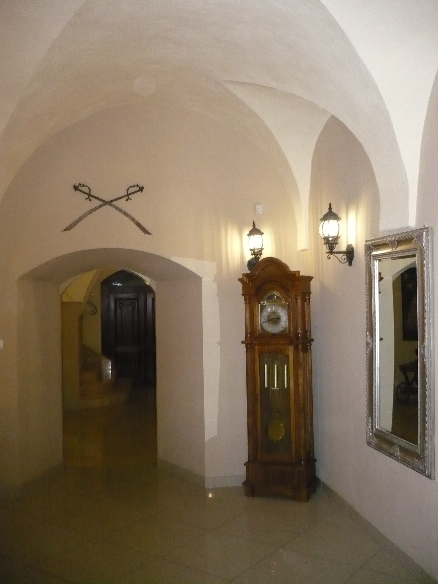 Nowa Ruda, ul. Kościelna 30 - Dwór Górny, obecnie hotel, XVII, XIX w. (zabytek nr A/940/652/WŁ z 25.05.1977)